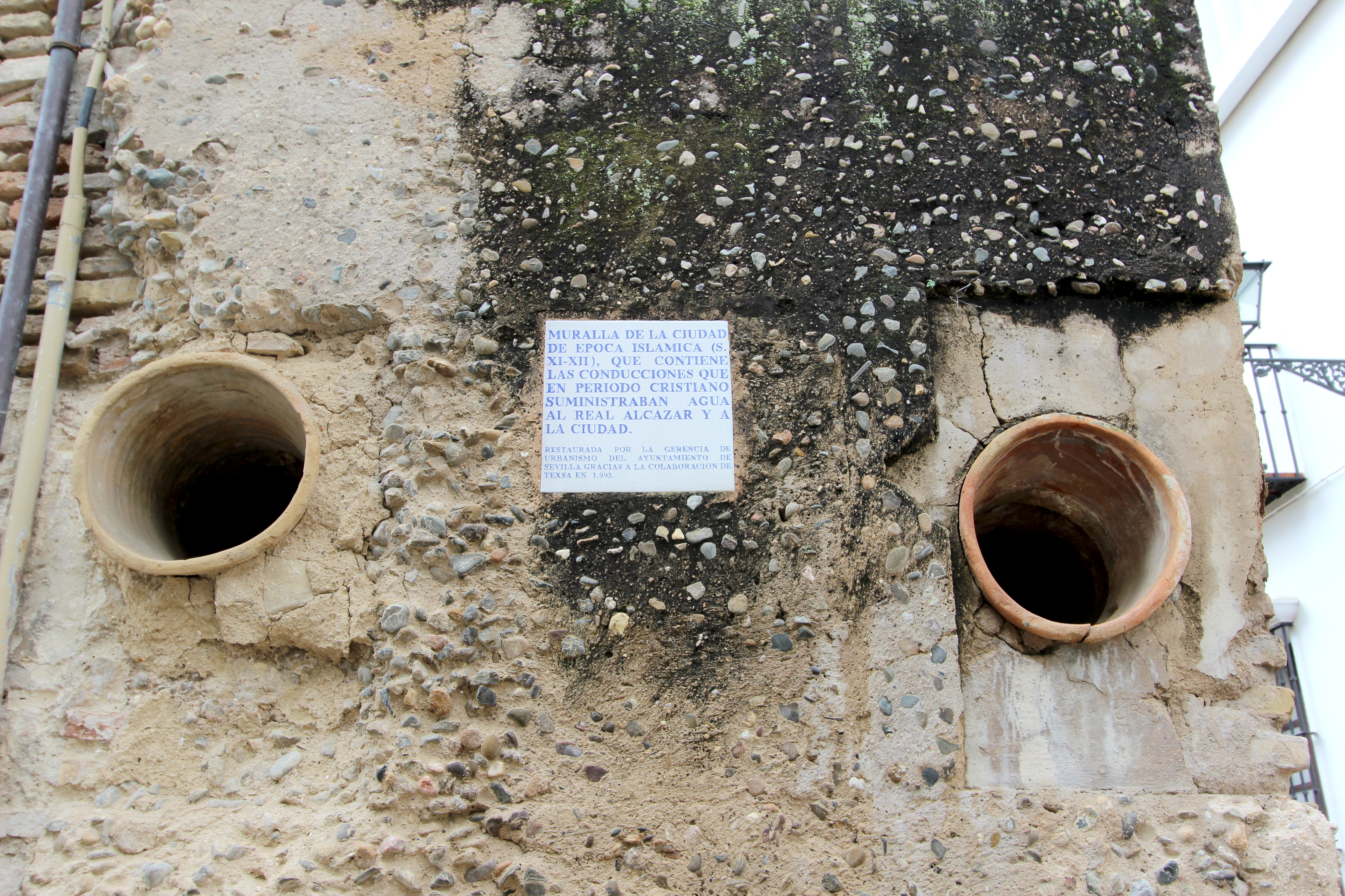 41001–41080 Sevilla. Altes Wasserleitungssystem in der Altstadt von Sevilla. Aufnahme von 2018.